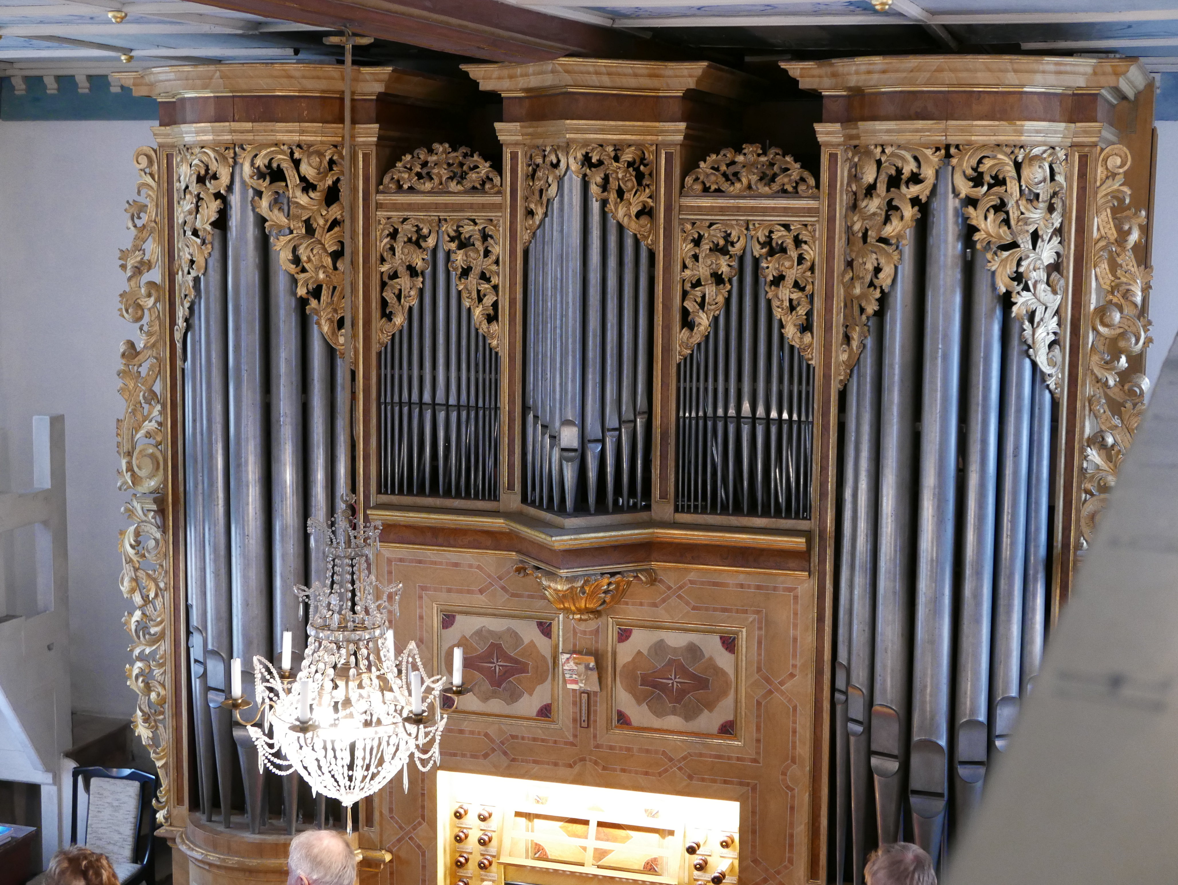 Silbermannorgel (1715) in der Kirche St. Georg Pfaffroda (Olbernhau) (Detail)